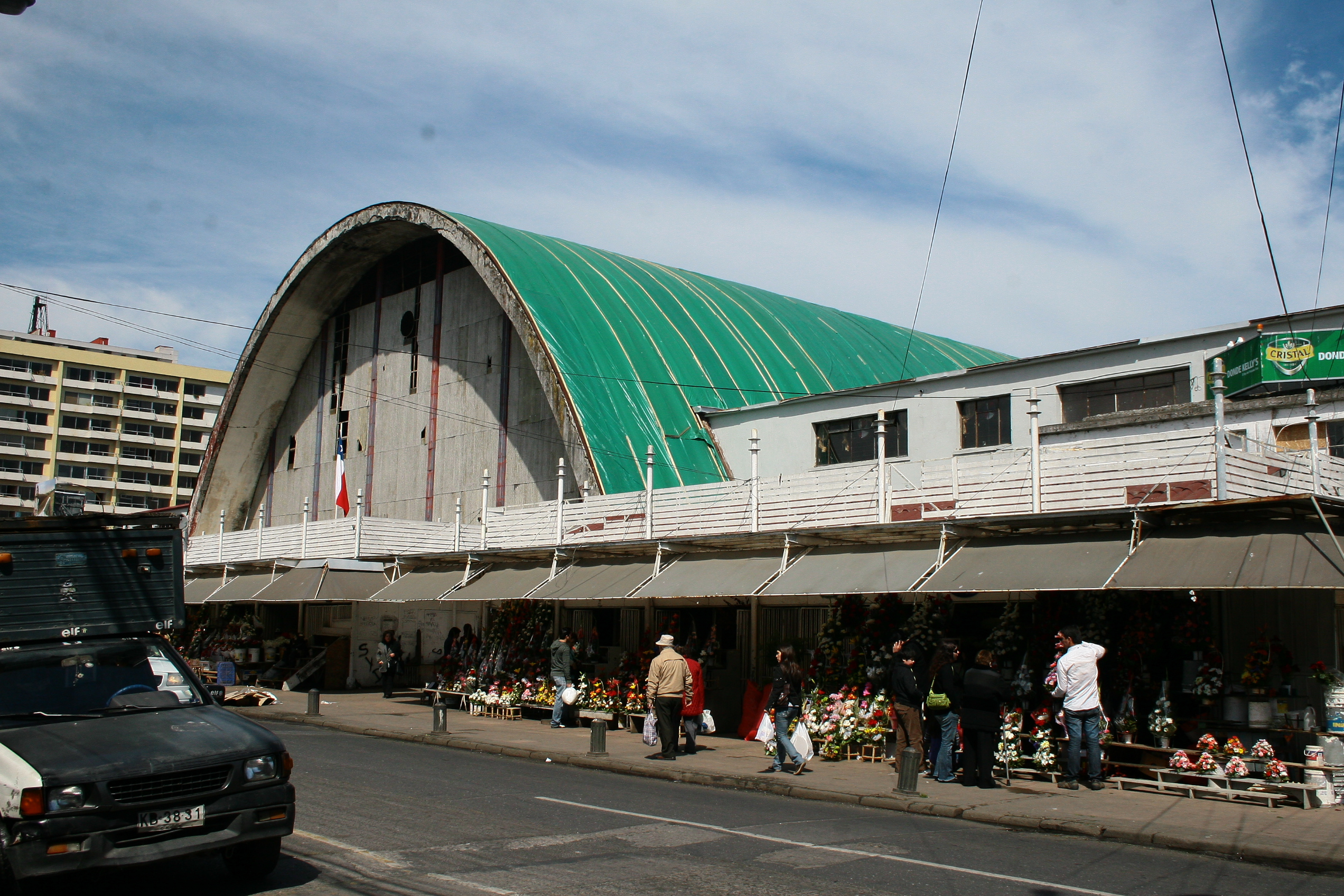 Mercado Central de Concepción a 7 meses de terremoto